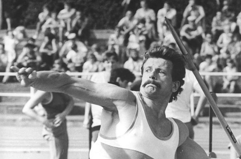 Detlef Michel ADN-ZB Koard 22.8.87 Potsdam: 38. DDR-Leichtathletik-Meisterschafte- Weltmeister Detlef Michel vom TSC Berlin gewann die Speerwurfkonkurrenz mit 81,86 m.